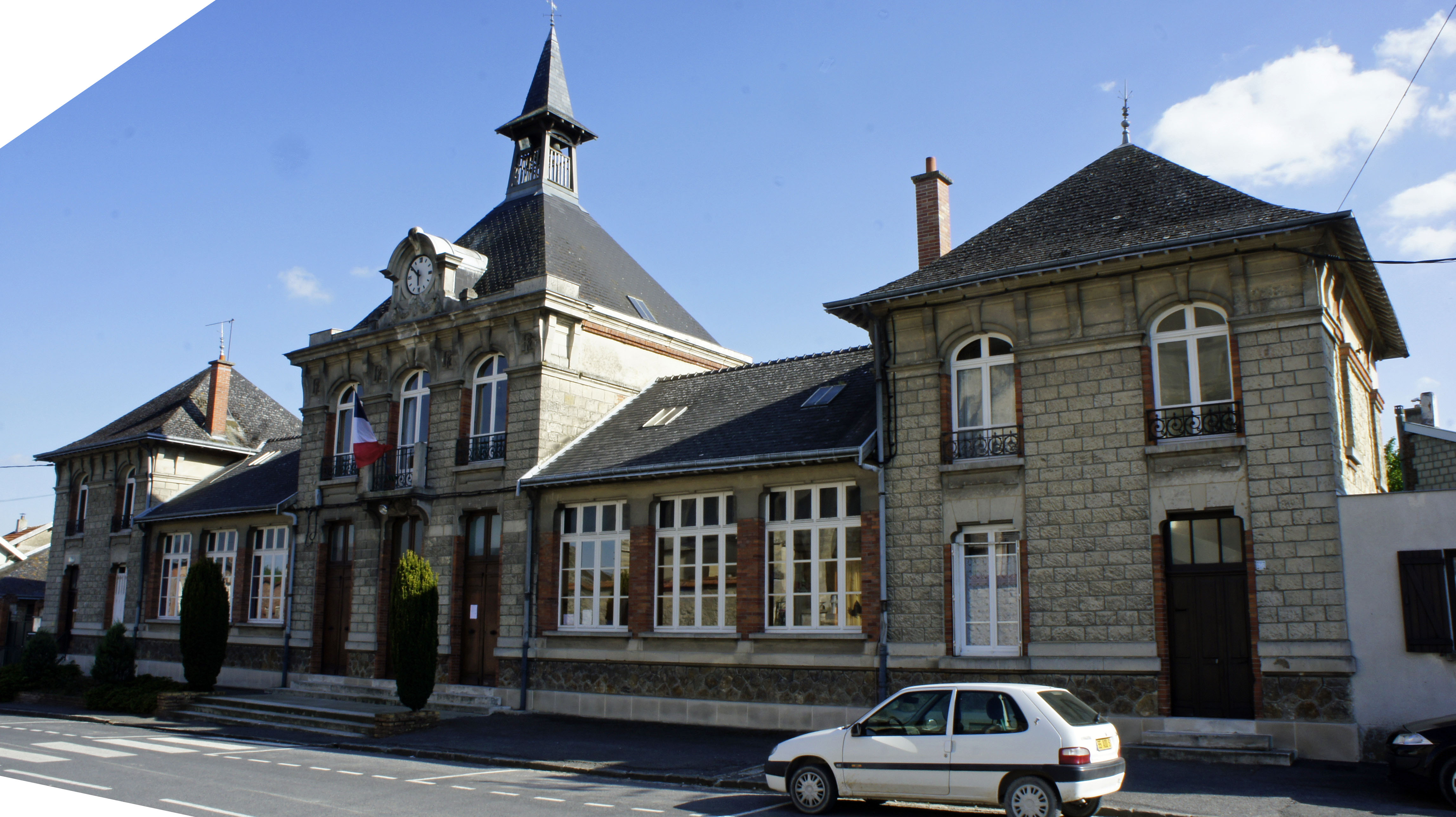 Vue de la mairie de Lavannes.